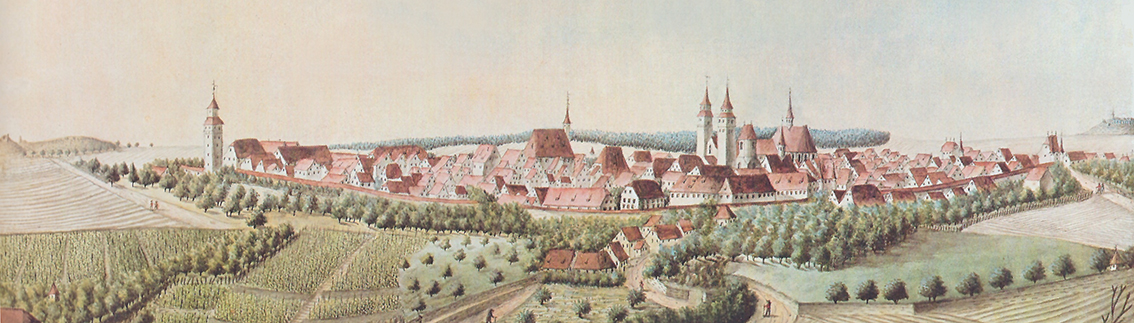 Markgröningen um 1800: Panorama von der Schlüsselburg bis zum Hohenasperg (Ausschnitt). Vorlage: Gemälde von Karl Urban Keller von 1797/98; im 19. Jahrhundert von einem unbekannten Bearbeiter reproduziert